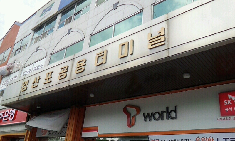 영산포공용버스터미널